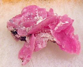 Fotografía de Pablo Alberto Salguero Quiles La rhodochrosite (MnCO3) est un carbonate de manganèse (II) cristallisant dans le système cristallin trigonal à réseau rhomboédrique, groupe d'espace R\bar{3}c, structure calcite. Son nom vient du grec "rhodon" rose et "chros (is)" couleur. Rose, rose-rouge, jaune, marron, la rhodochrosite forme une solution solide complète avec la sidérite. La substitution avec le calcium est limitée et l'existence de la kutnohorite Ca(Mn,Mg,Fe)(CO3)2, qui a une structure ordonnée type dolomite, suggère que la solution solide calcite – rhodochrosite soit limitée, du moins à température ordinaire. Le magnésium peut aussi remplacer le manganèse, mais la solution solide entre rhodochrosite et magnésite est incomplète. Quantités remarquables de zinc ont été aussi trouvées. La rhodochrosite est un minéral relativement rare qui se forme dans les veines hydrothermales des gîtes de Ag, Pb et Cu, associée avec d'autres minéraux de manganèse. Elle représente une source mineure de manganèse et est utilisée comme pierre ornementale. Elle peut difficilement être taillée à cause de sa faible dureté. La rhodochrosite est la pierre nationale de l’Argentine.